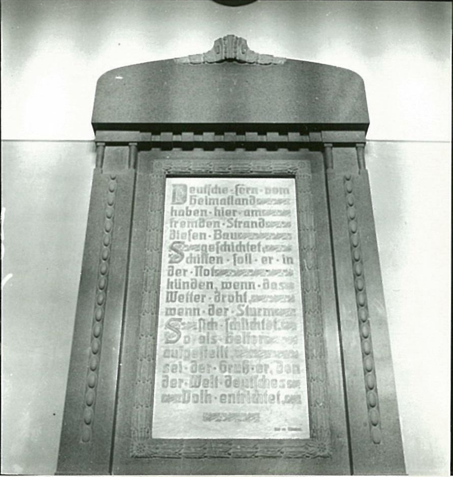 青岛观象台德文诗碑旧影